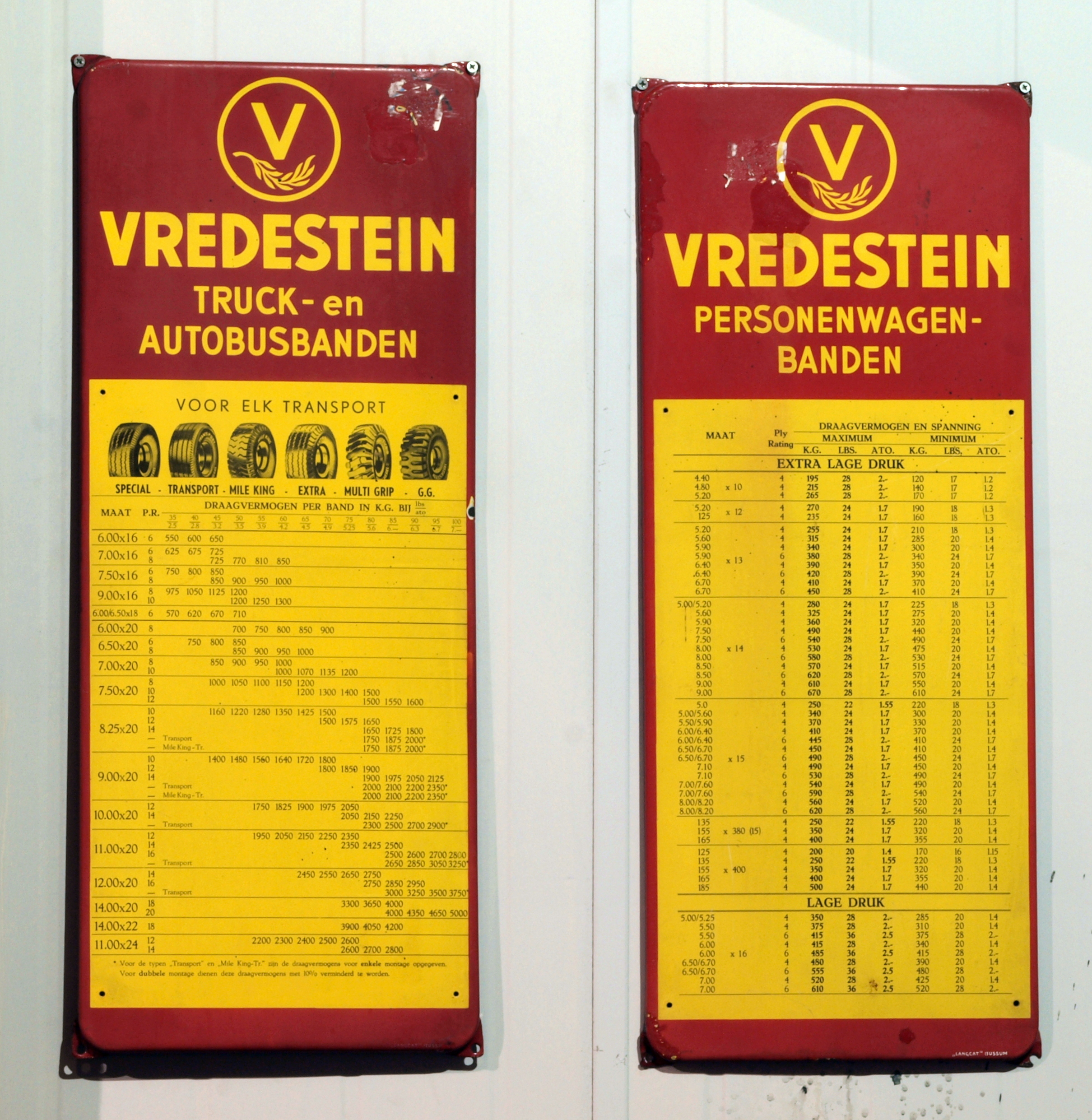 Den Hartogh Ford Museum. Vredestein Truck-en Autobusbanden Vredestein Personenwagenbanden